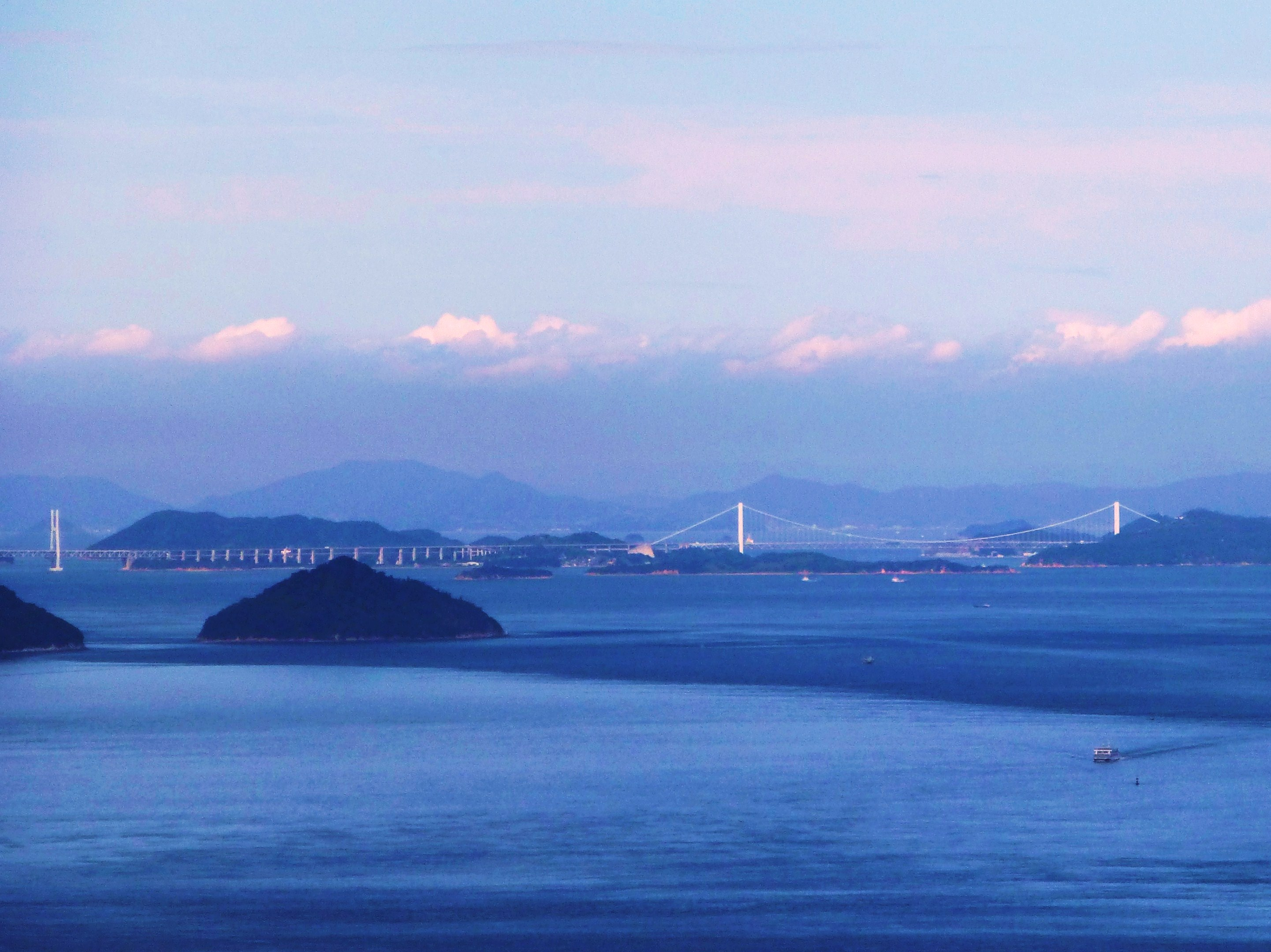 瀬戸大橋(獅子の霊厳)